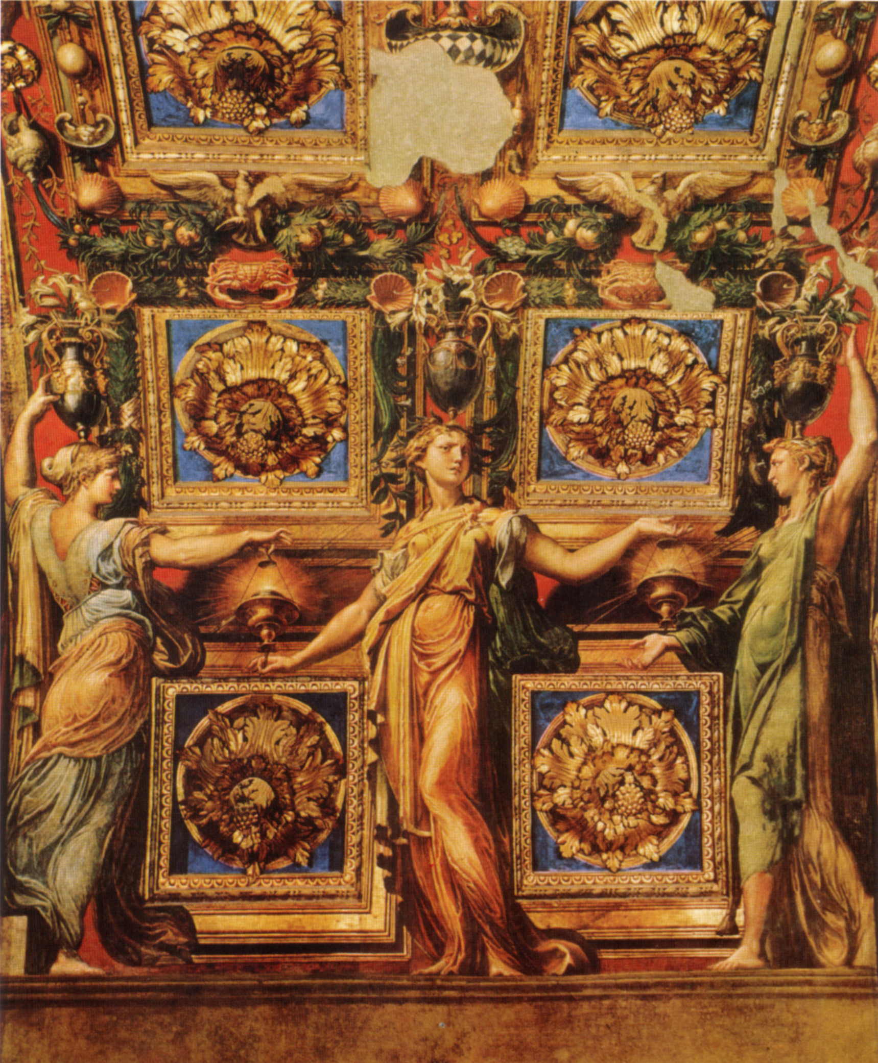 detail